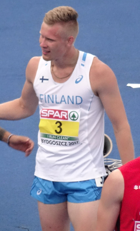 Młodzieżowe Mistrzostwa Europy w Lekkoatletyce U23 w Bydgoszczy 2017; dziesięciobój mężczyzn, bieg na 1500 m finał